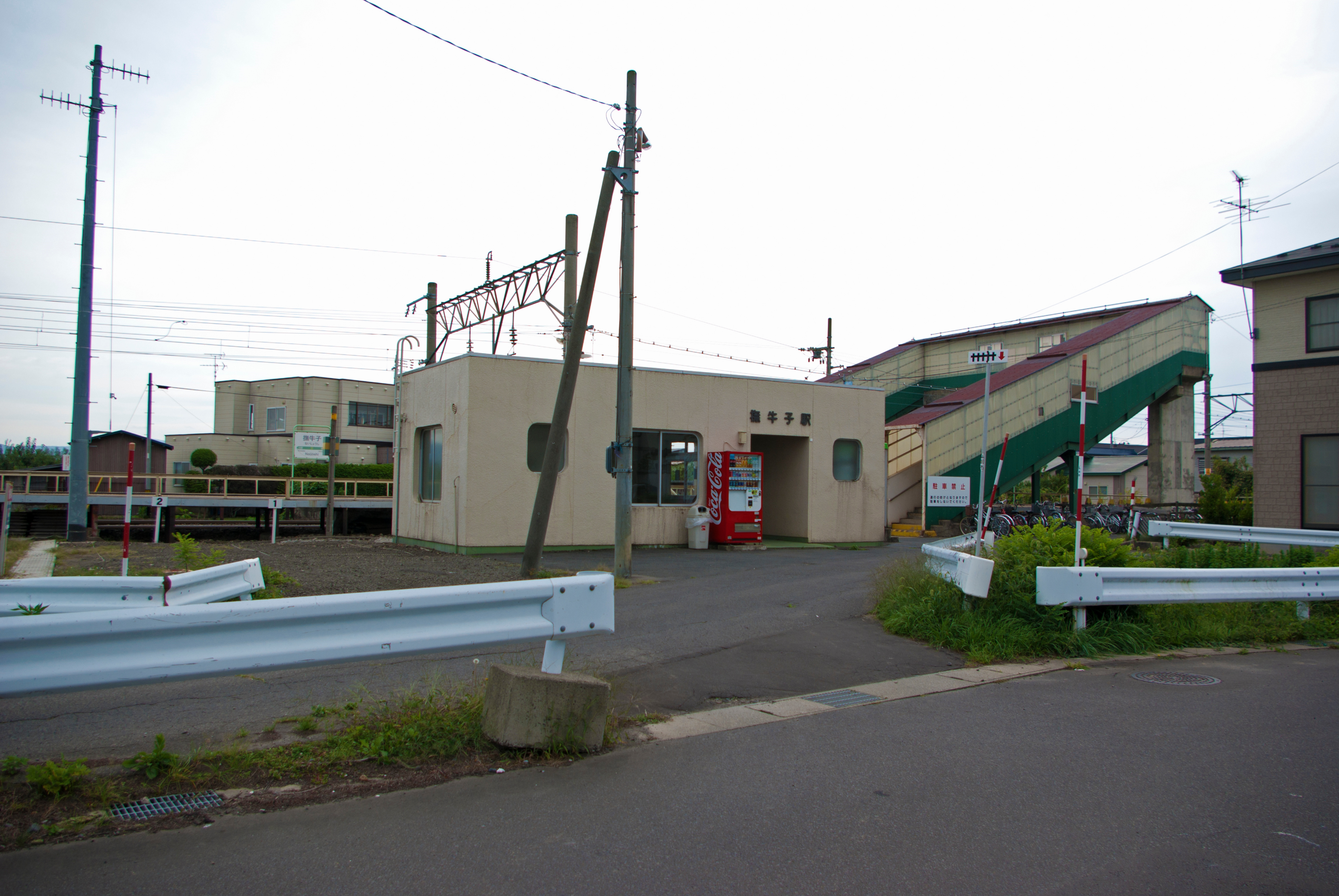 東日本旅客鉄道奥羽本線撫牛子駅